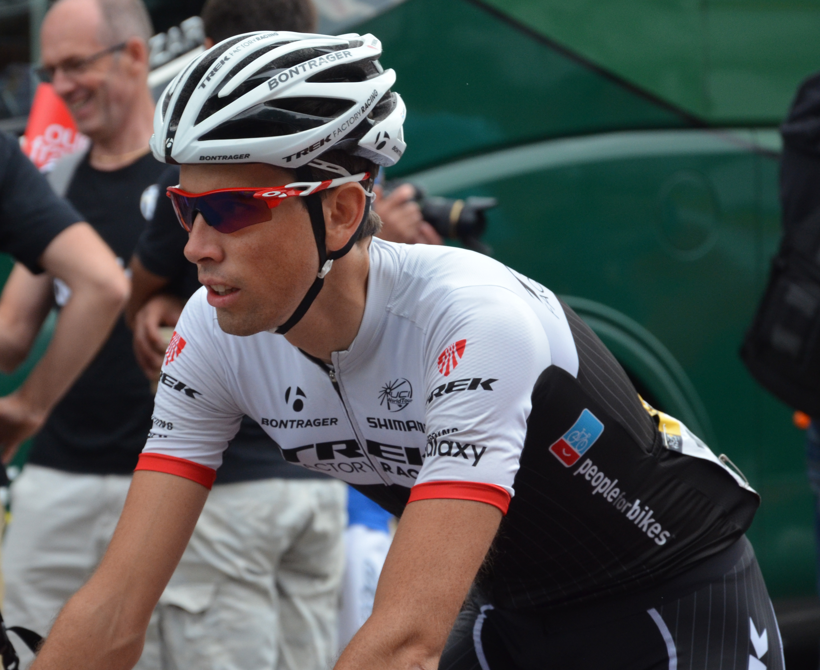 Laurent Didier au départ de la 8ème étape du Tour de France 2015, à Rennes.